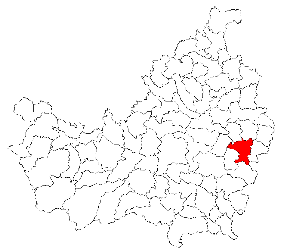 Categorie:Hărţi ale judeţului Cluj